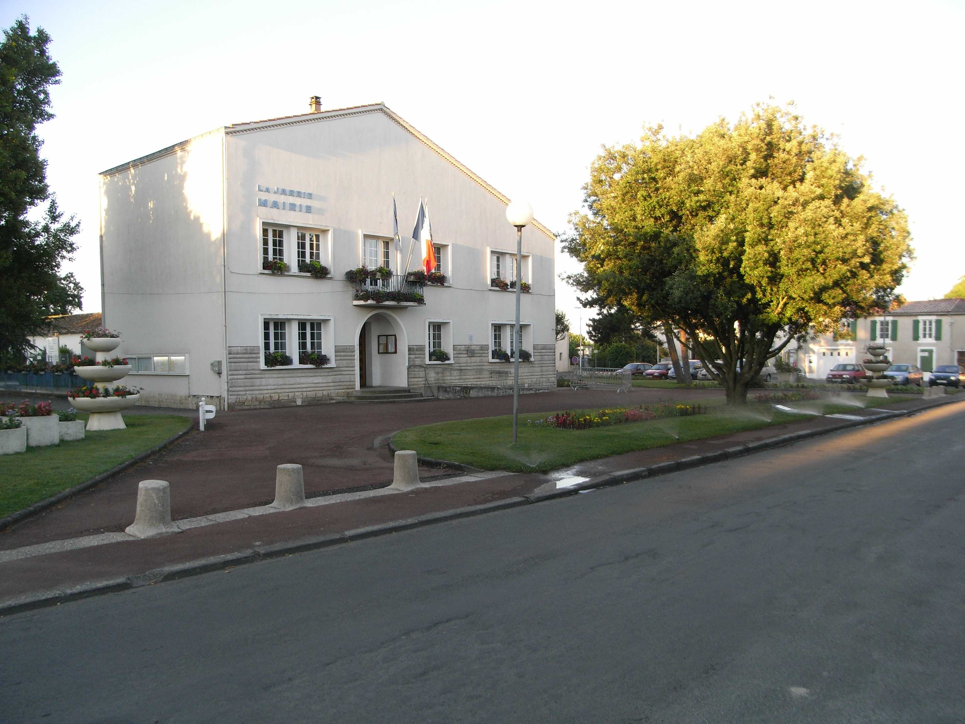 Urbdomo de komunumo "La Jarrie" (Charente-Maritime - Francujo)